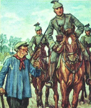 Zigarettenbilder Waldorf-Astoria: Das Reichsheer und seine Tradition Bild 325, Alte Armee, Ulanen-Regiment König Wilhelm I. (2. Württembergisches) Nr. 20:Fernpatrouille in Flandern, Oktober 1914